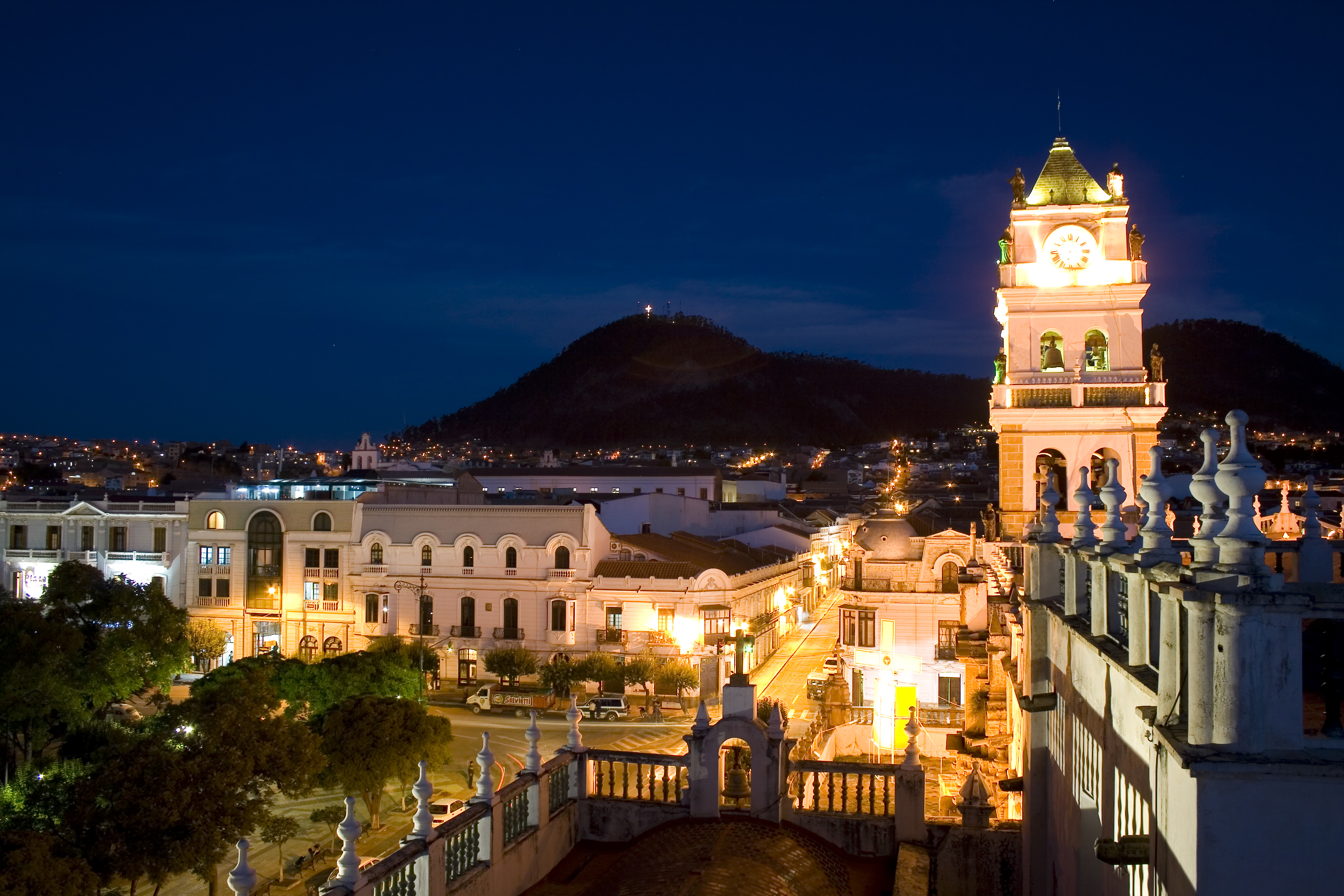 Catedral (plaza principal) This medium shows the protected monument with the number H/00-001 in Bolivia.